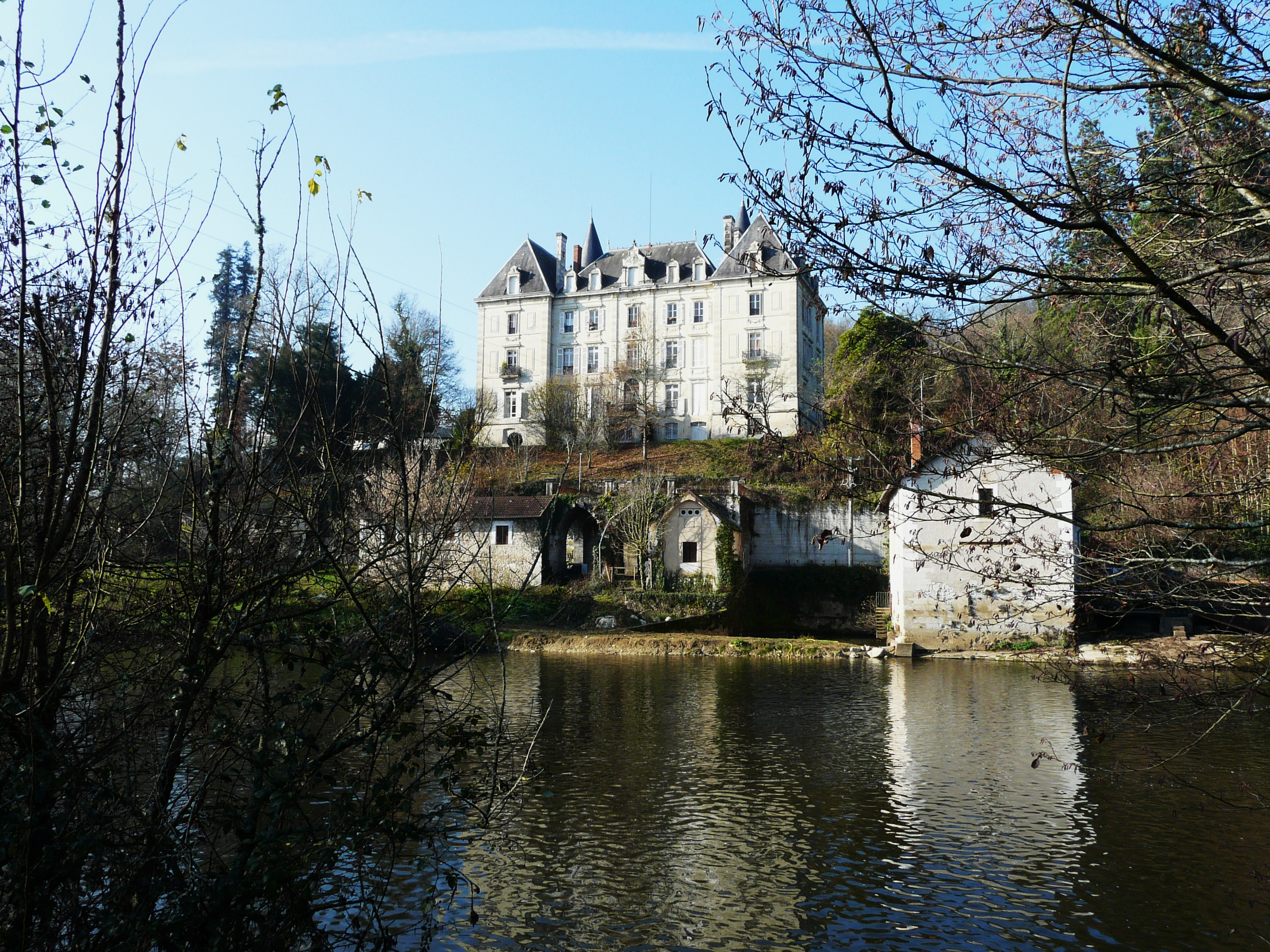 Au-dessus de l'Isle, la façade est du château de la Roche à Annesse-et-Beaulieu, Dordogne, France